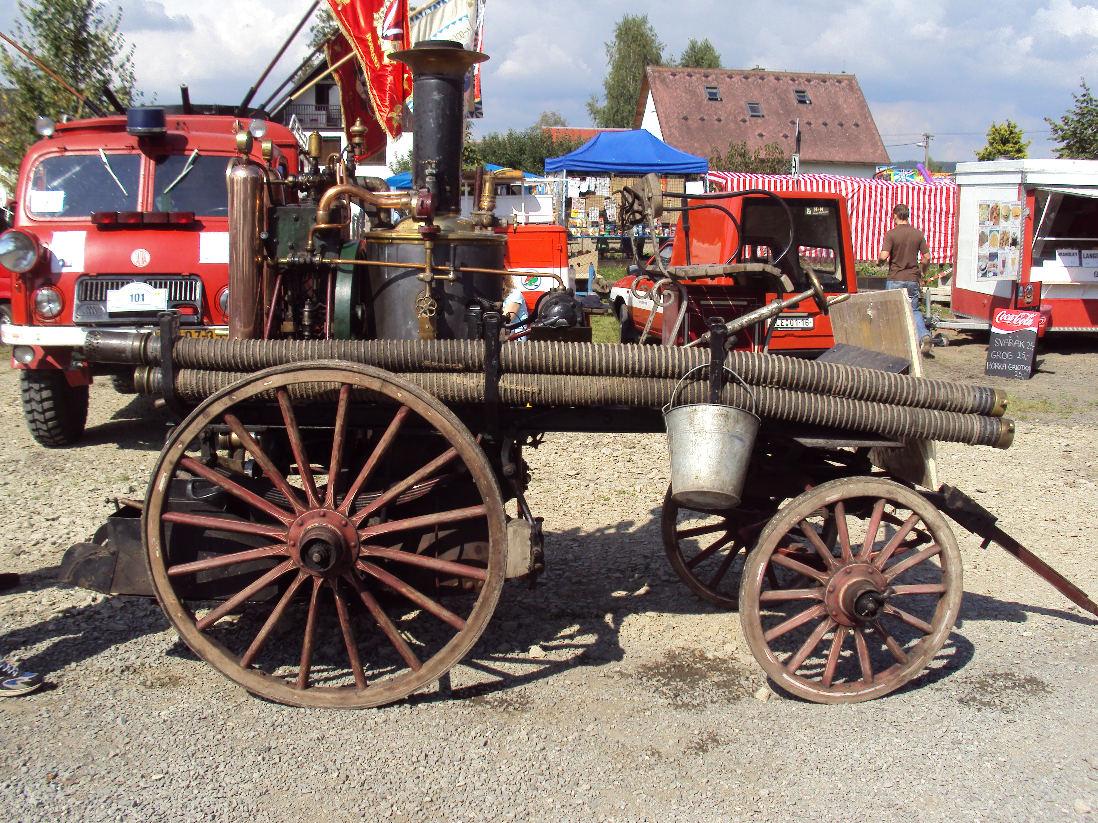 Hasičská stříkačka fa Smékal z roku 1907, focena na Zákupských slavnostech 2010, patří hasičům z Roztok u Jilemnice